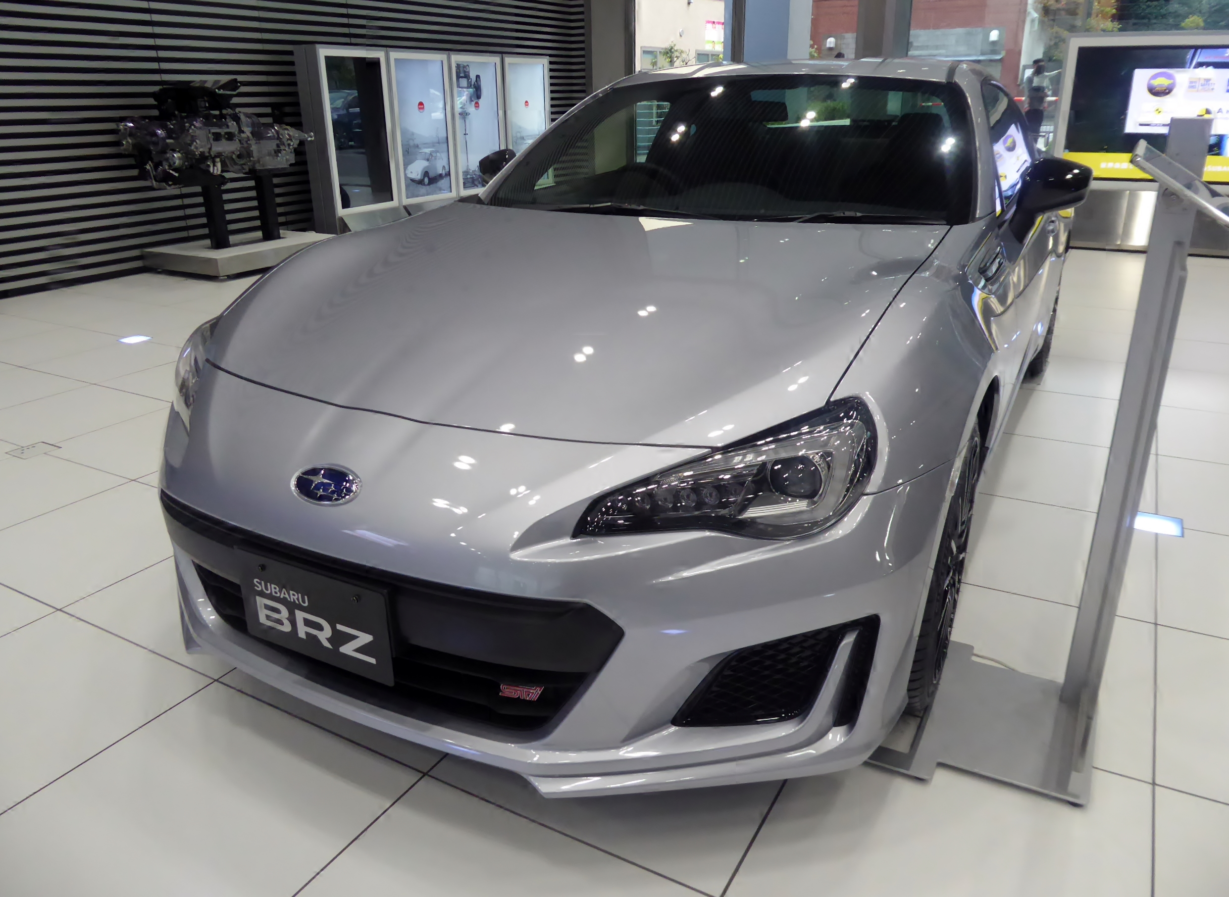 DBA-ZC6型スバル・BRZ STI Sportをフロントから撮影。